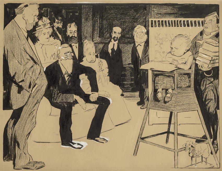 Rudolf Wilke: Das Wunderkind. Tusche (Feder und Pinsel), Kohle und Deckweiß auf Papier, 38,5 x 50 cm